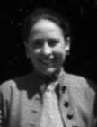 Paul Tournon et Marion Tournon-Branly, Vézelay, 1956. Archives nationales (Fontainebleau), 20060041/2. Photographe inconnu